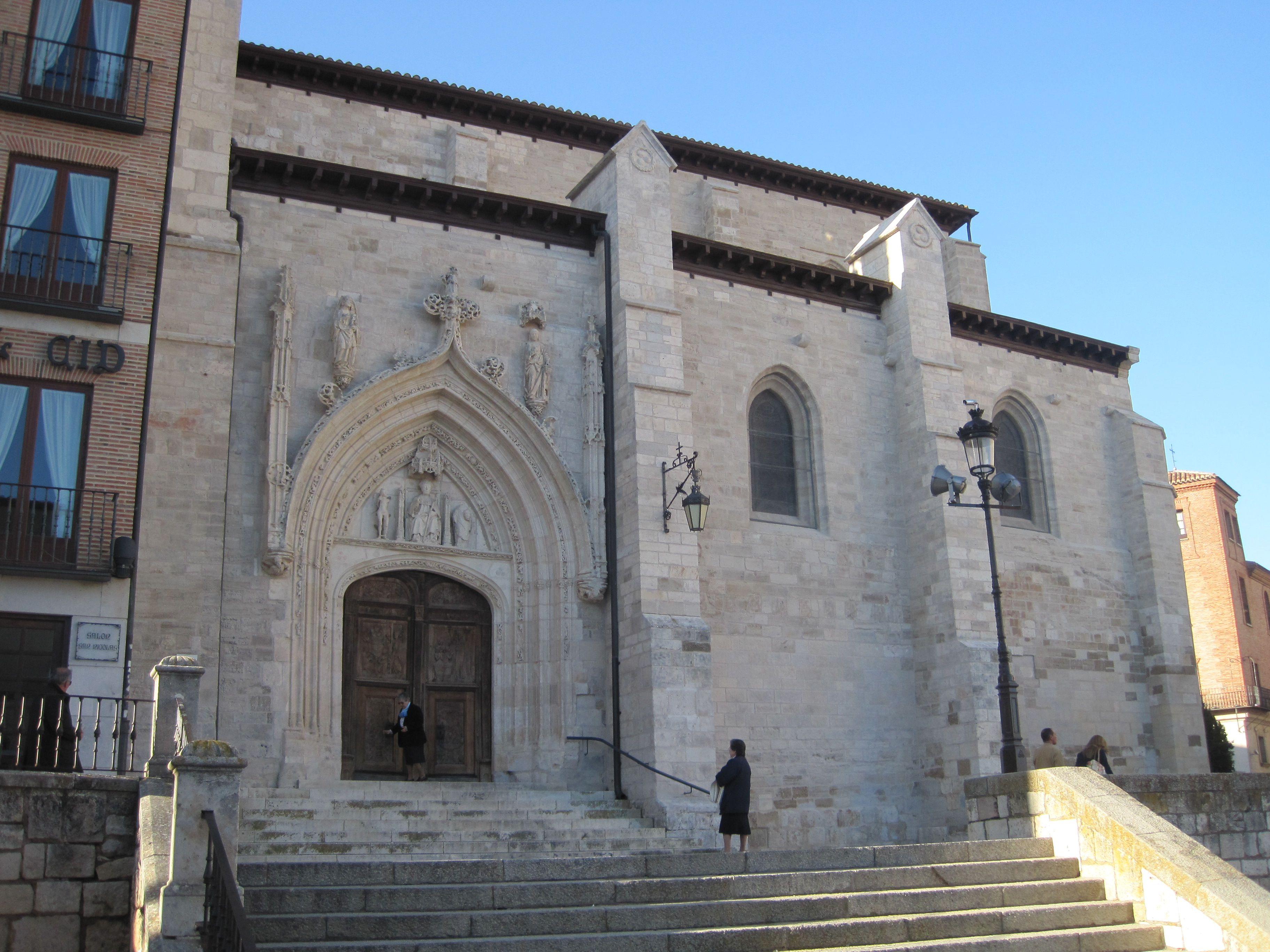 San Nicolás de Bari desde la entrada principal.